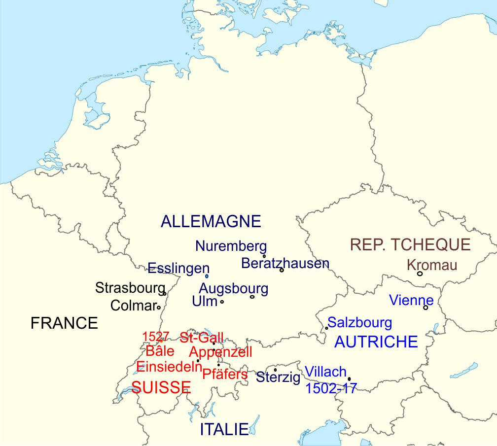 Paracelse, principaux lieux de séjour de Paracelse